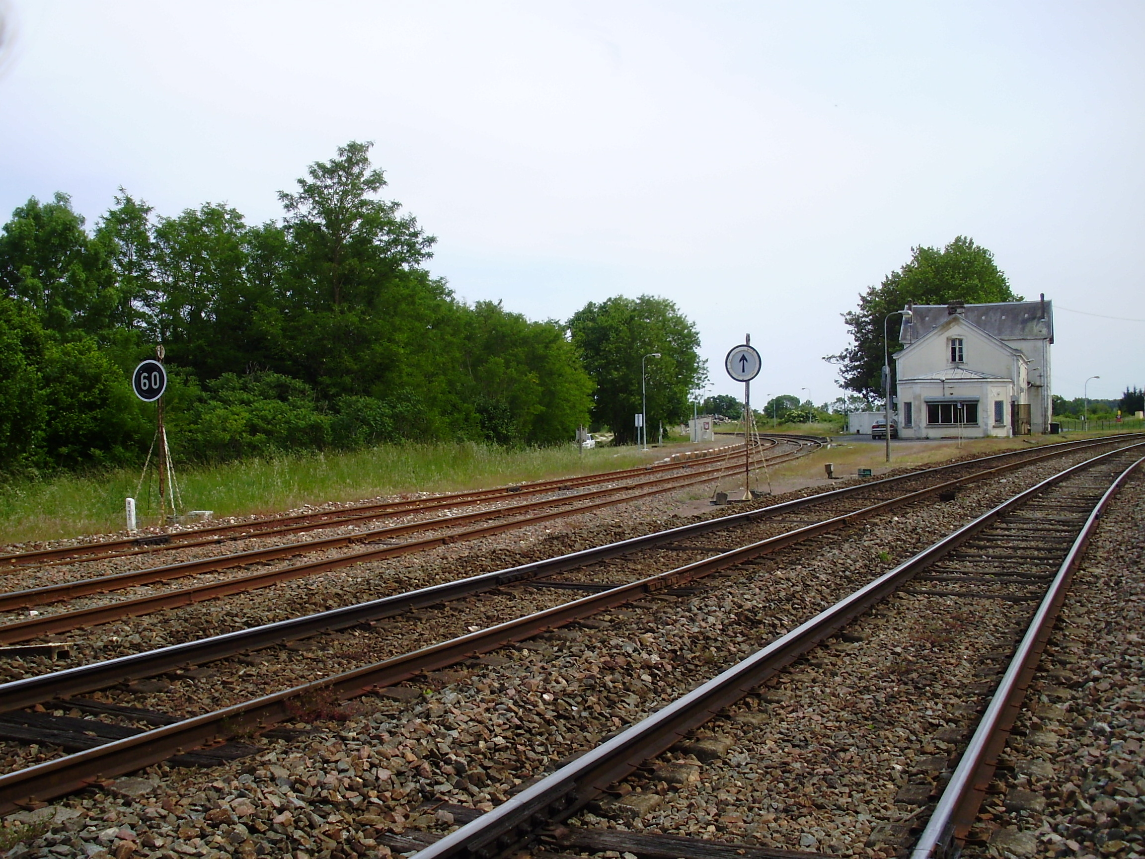 Bifurcation au nord-ouest de la gare de Beillant, Charente-Maritime, France, avec à gauche les voies vers Angoulême et à droite celles vers Bordeaux.